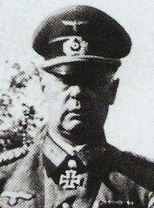 Il generale Eberhard von Mackensen sul fronte di Anzio nel gennaio 1944